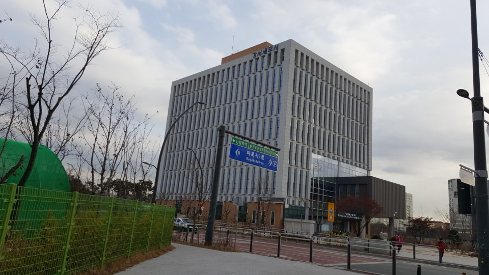 강서세무서